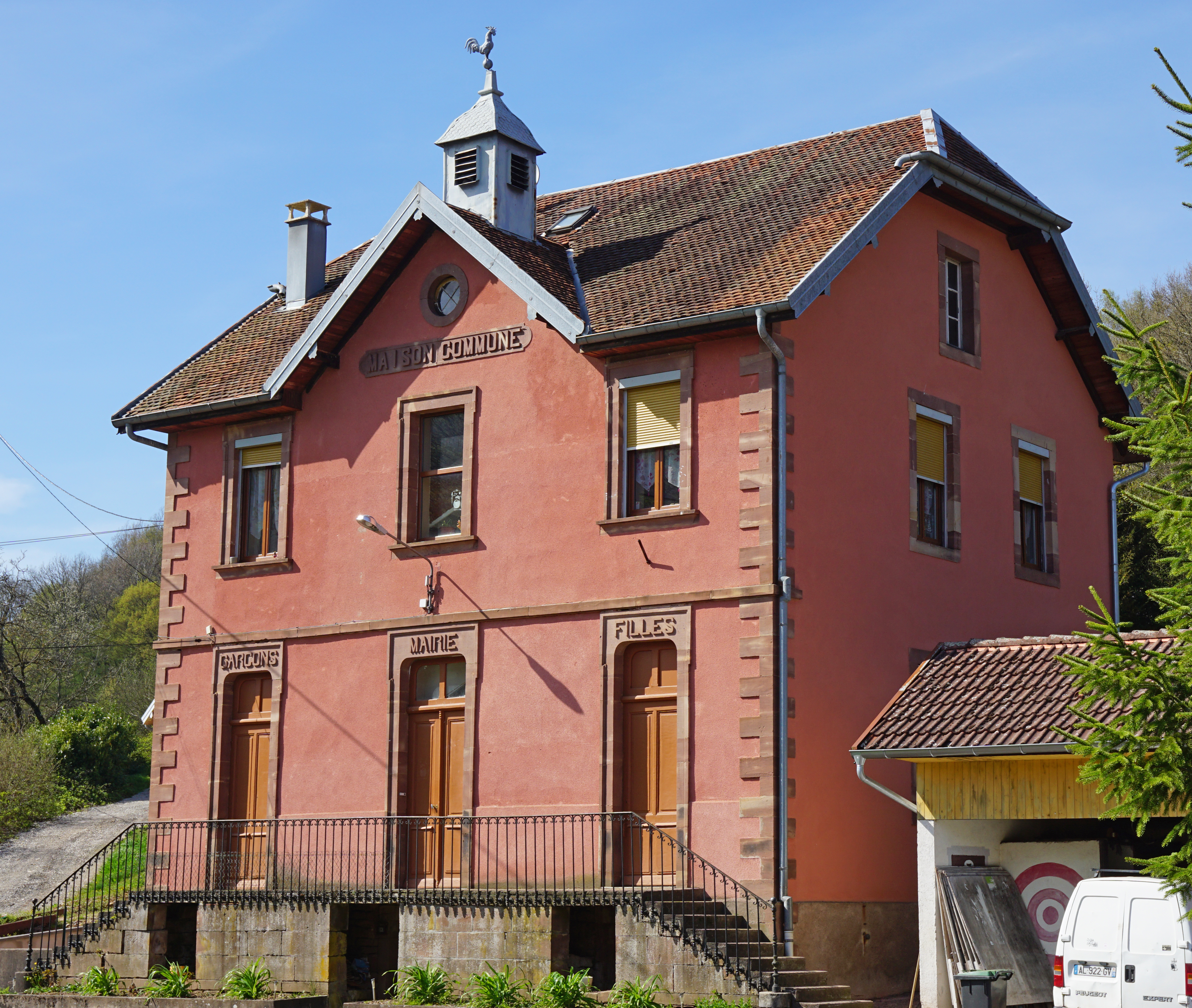 La mairie de Courmont.